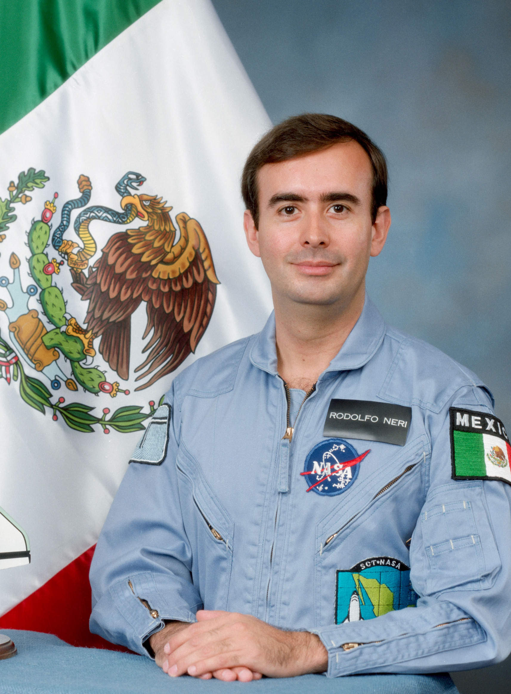 Rodolfo Neri Vela, ingeniero mexicano, primer y hasta ahora único astronauta que ha ido al espacio representando a México en el espacio.